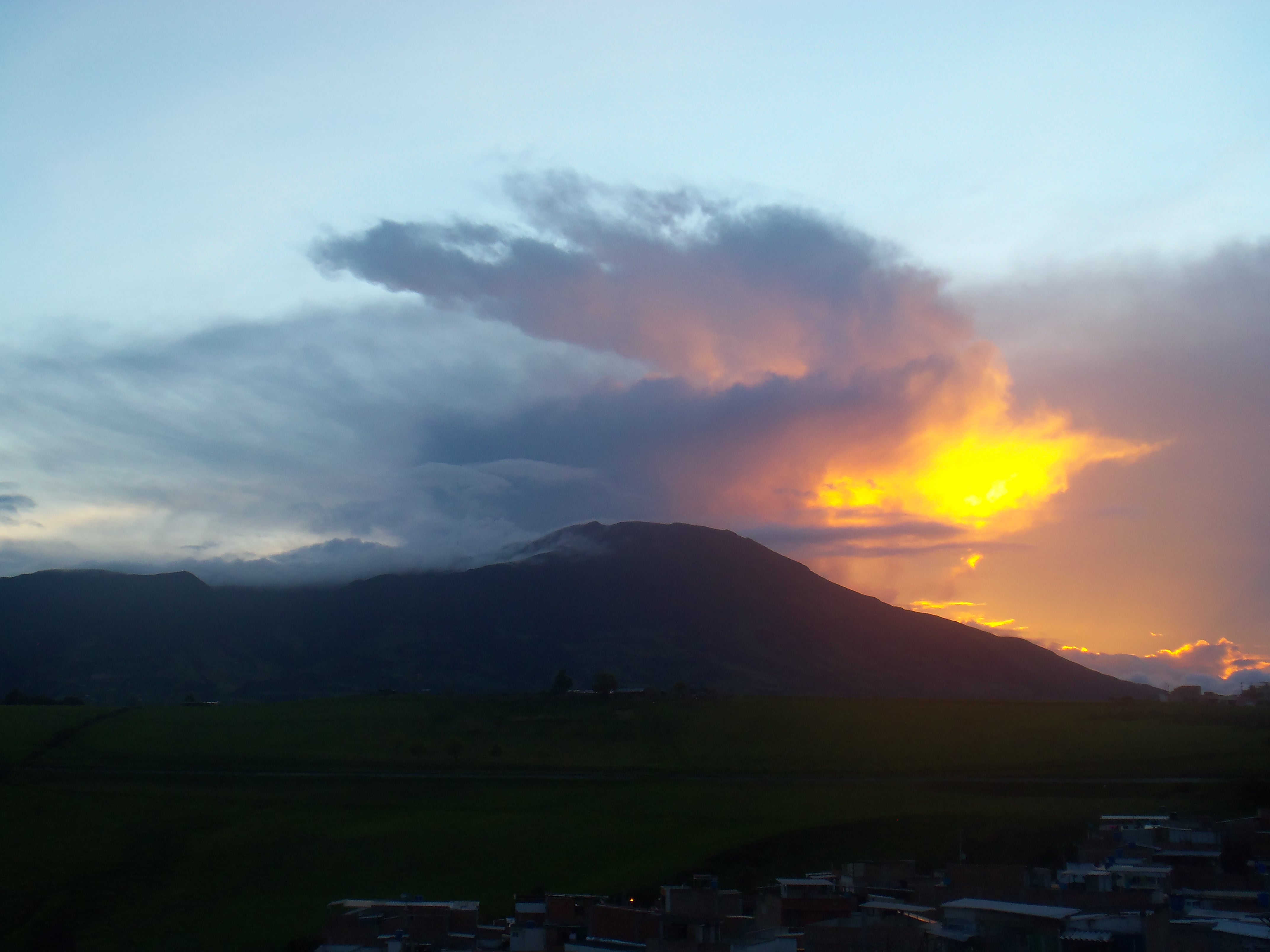 Nariño